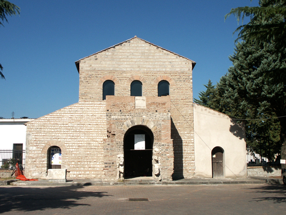 Autore Alvimas: Foto personale